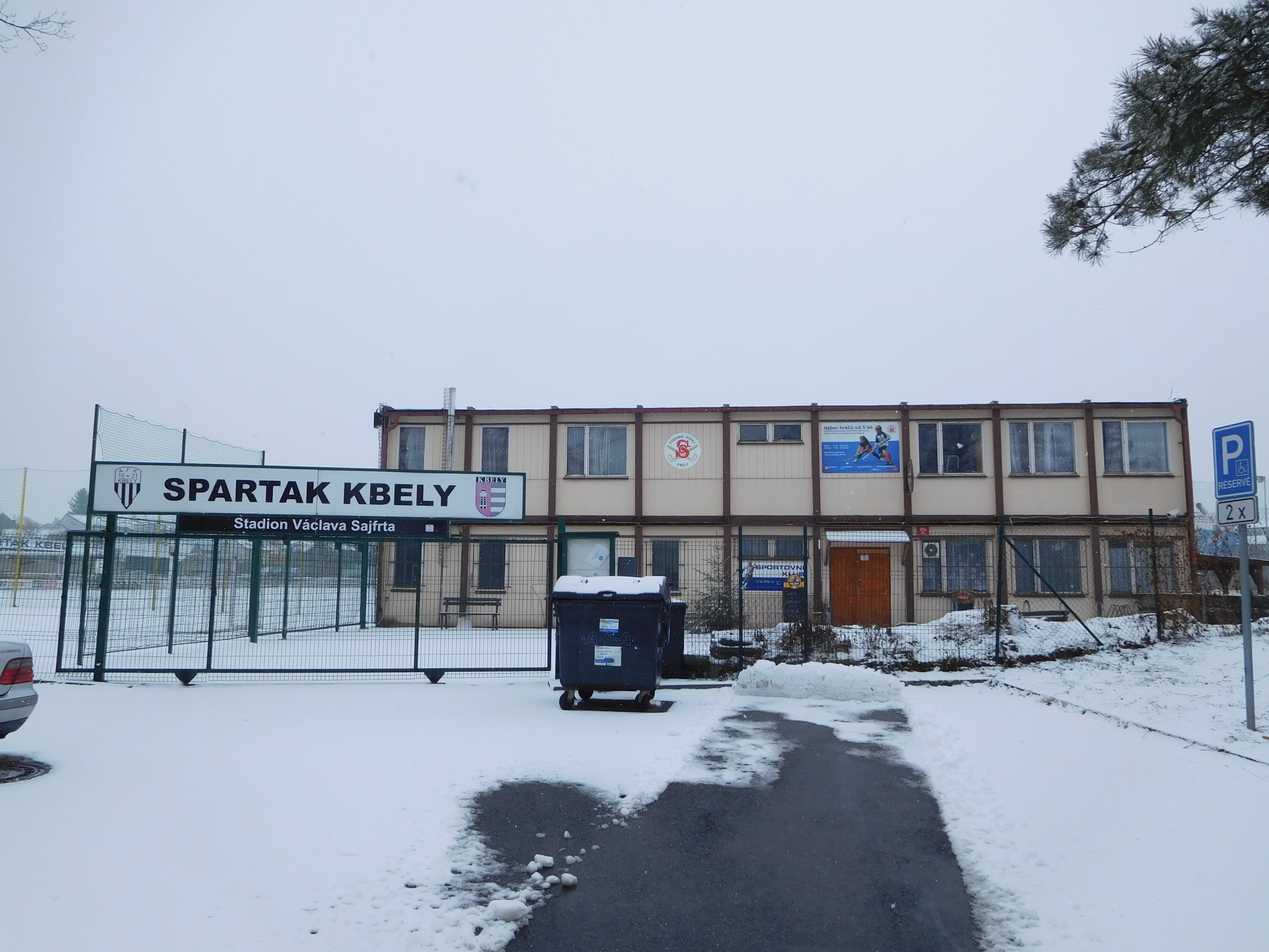 Praha - Kbely, Železnobrodská - stadion TJ Sokol Kbely a TJ Spartak Kbely